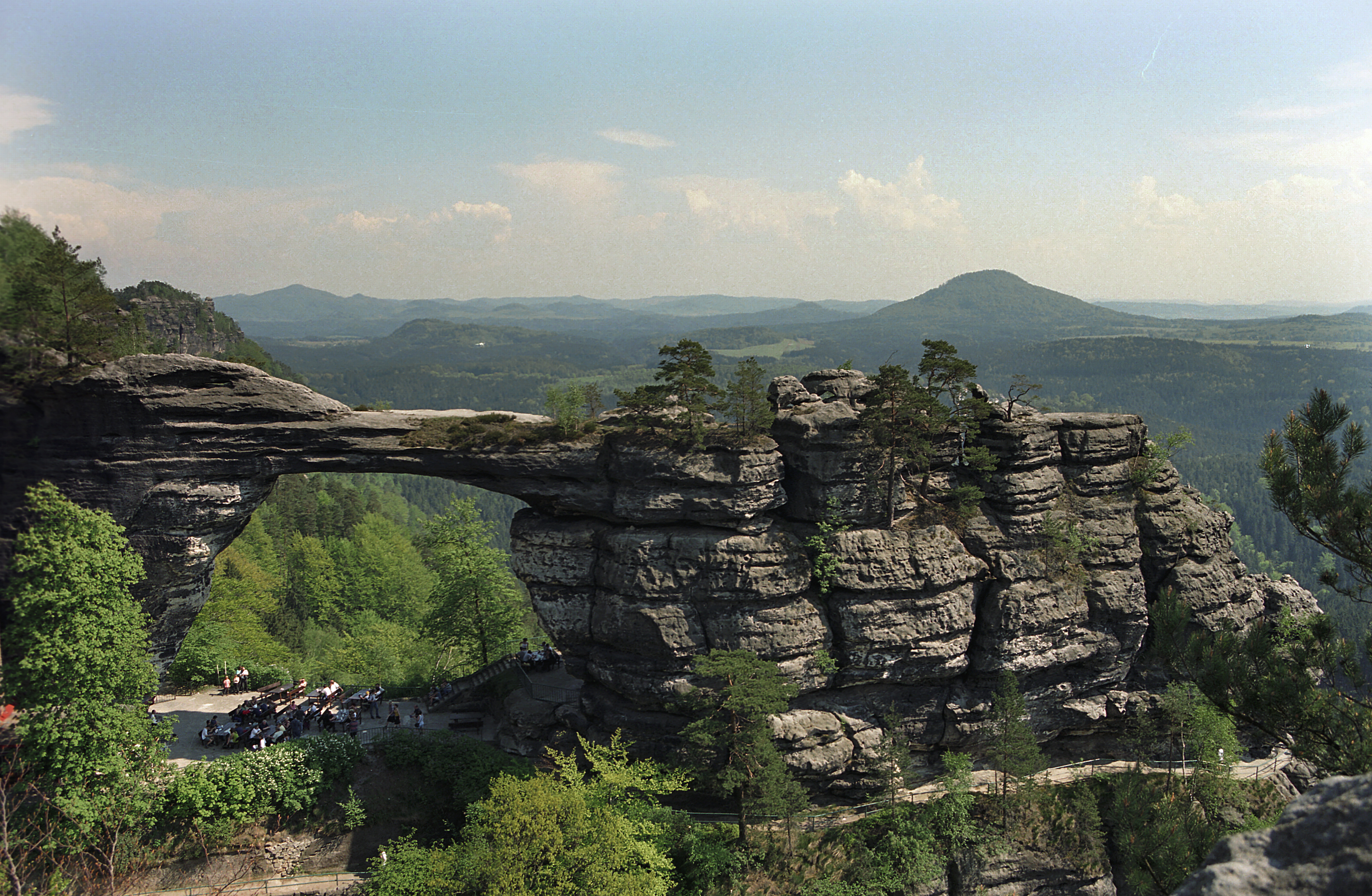 Pravčická brána